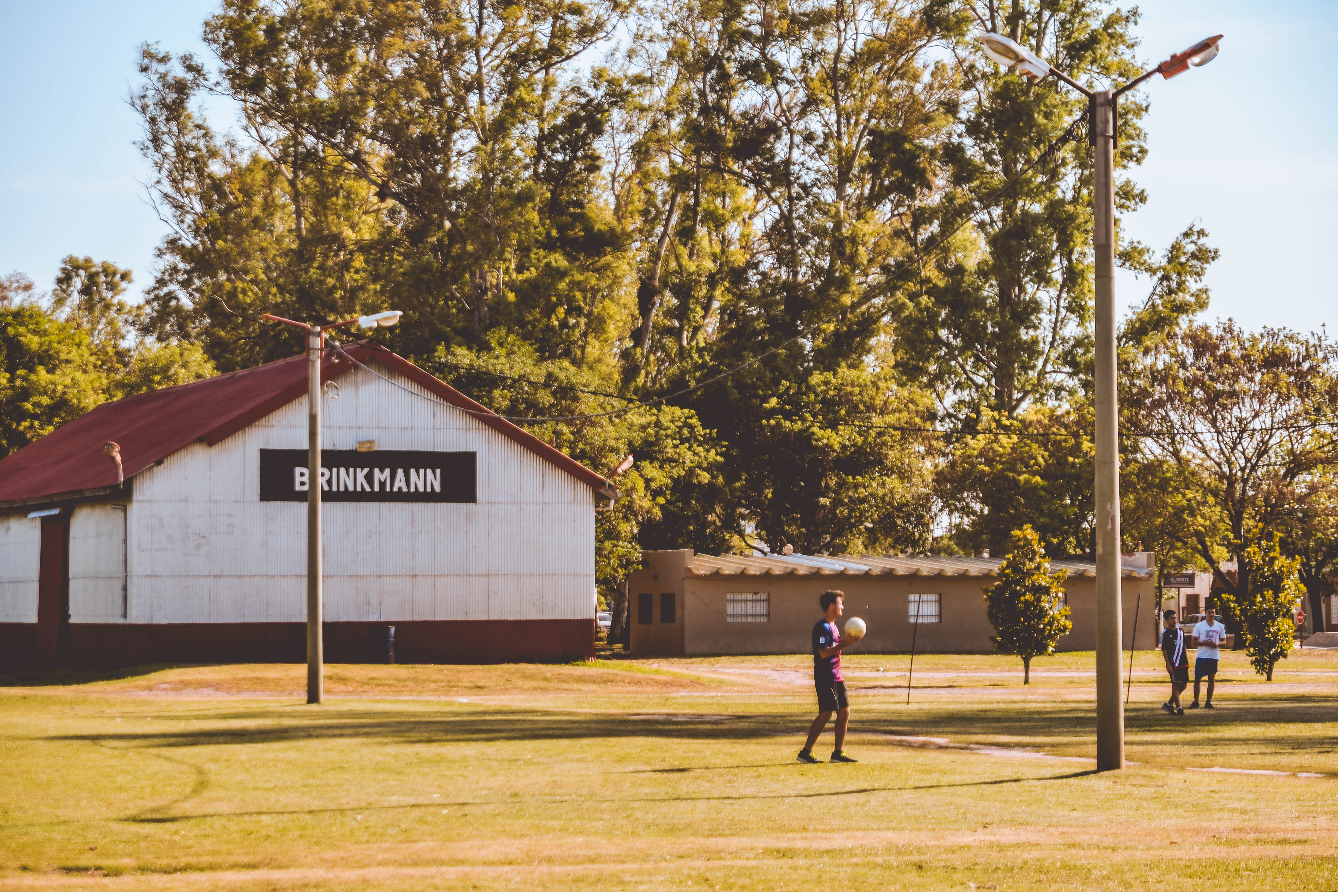 Estación de tren - Ciudad de Brinkmann - Cordoba